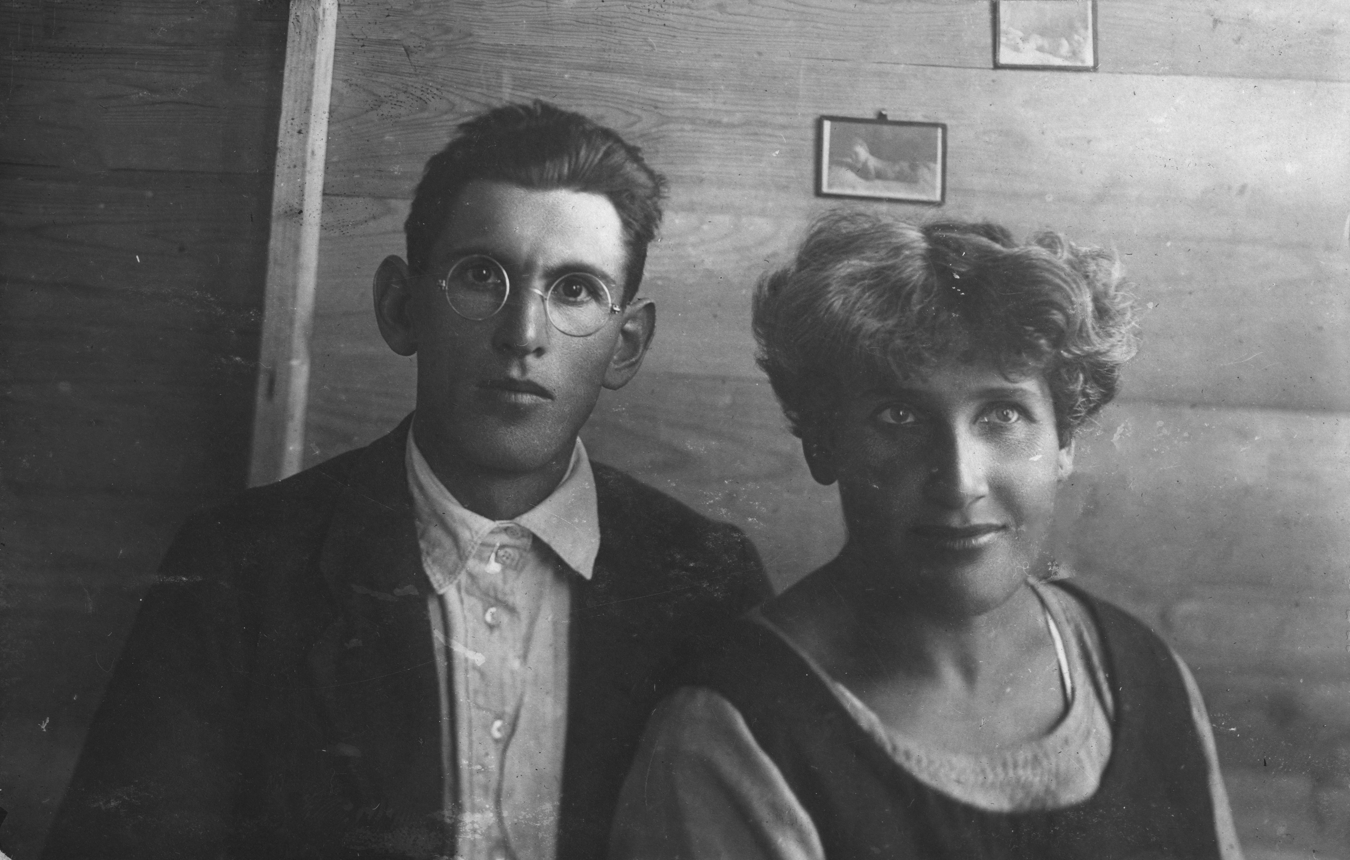 שרה ושמואל סבוראי מייסד המוזאון